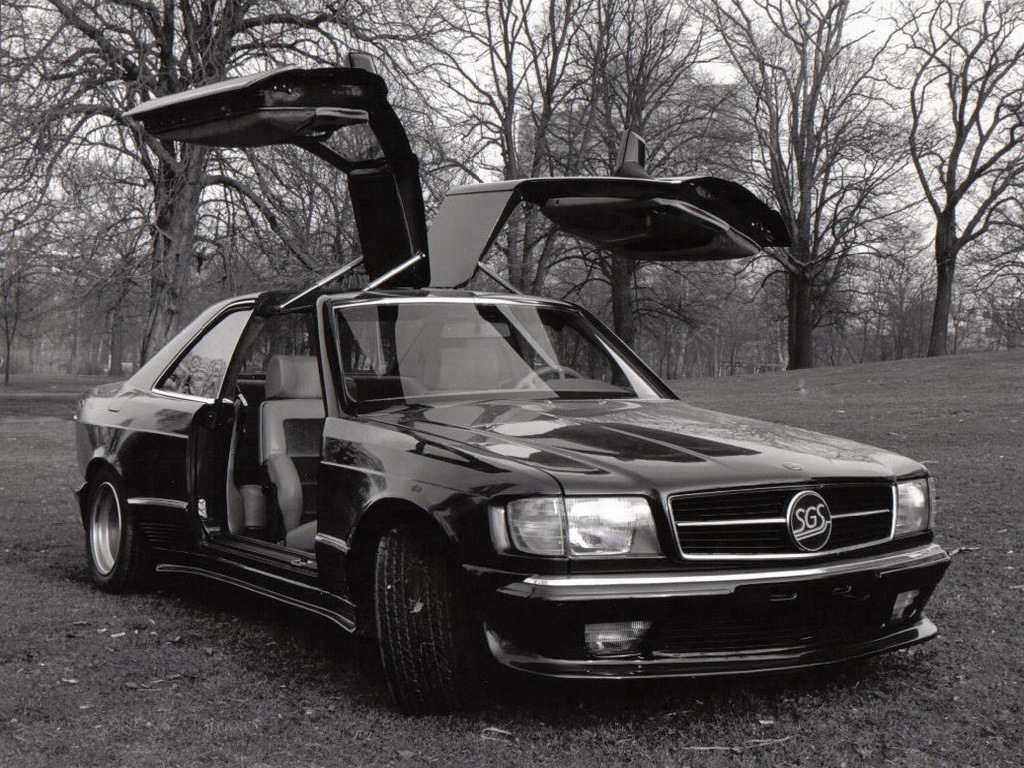 SGS 500 SEC Gullwing (C126) Styling Garage 1982–86